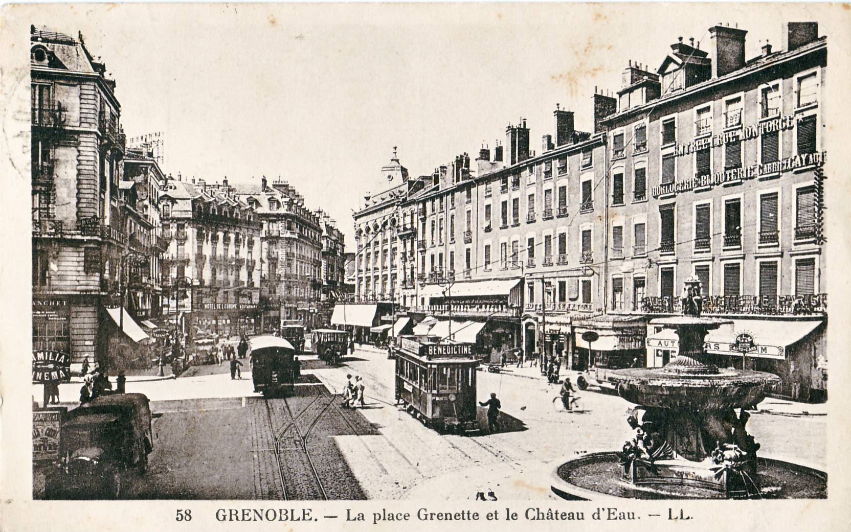 Carte postale ancienne éditée par LL N° 58 GRENOBLE : La place Grenette et ses tramways